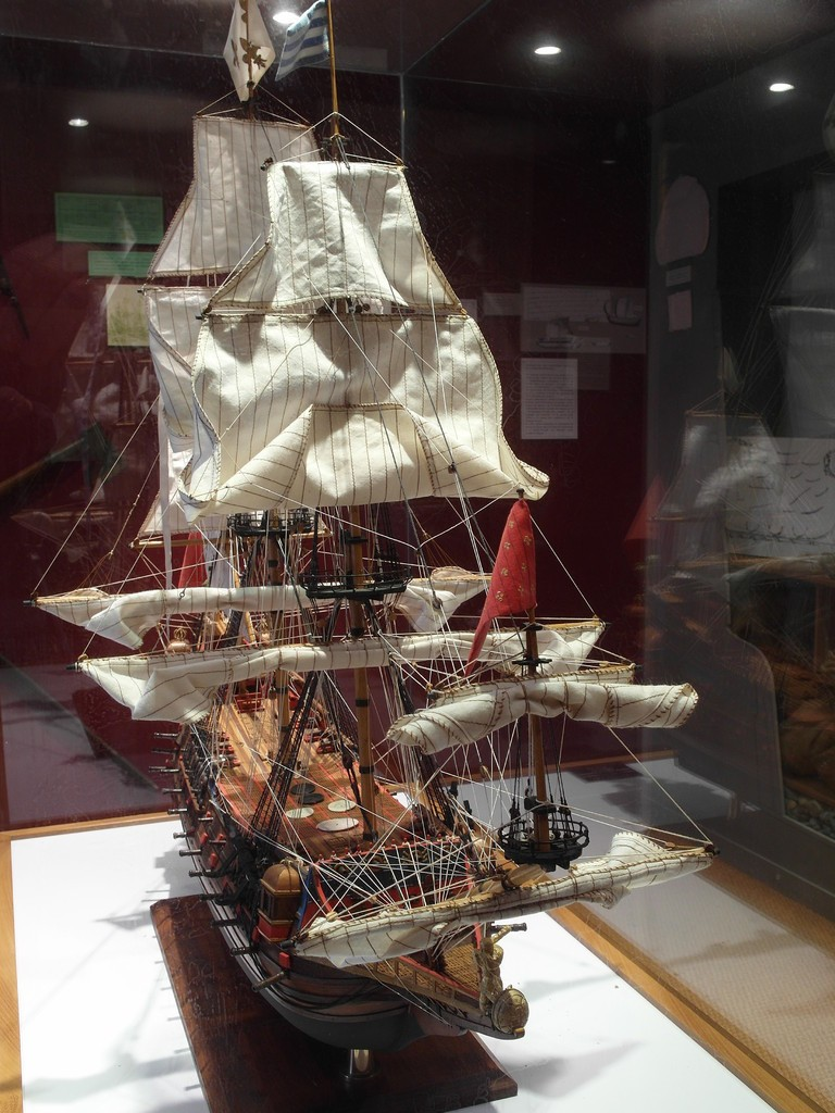 Maquette du vaisseau de guerre "La Couronne"